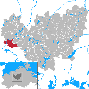 Warnow in Mecklenburg-Vorpommern - District Güstrow